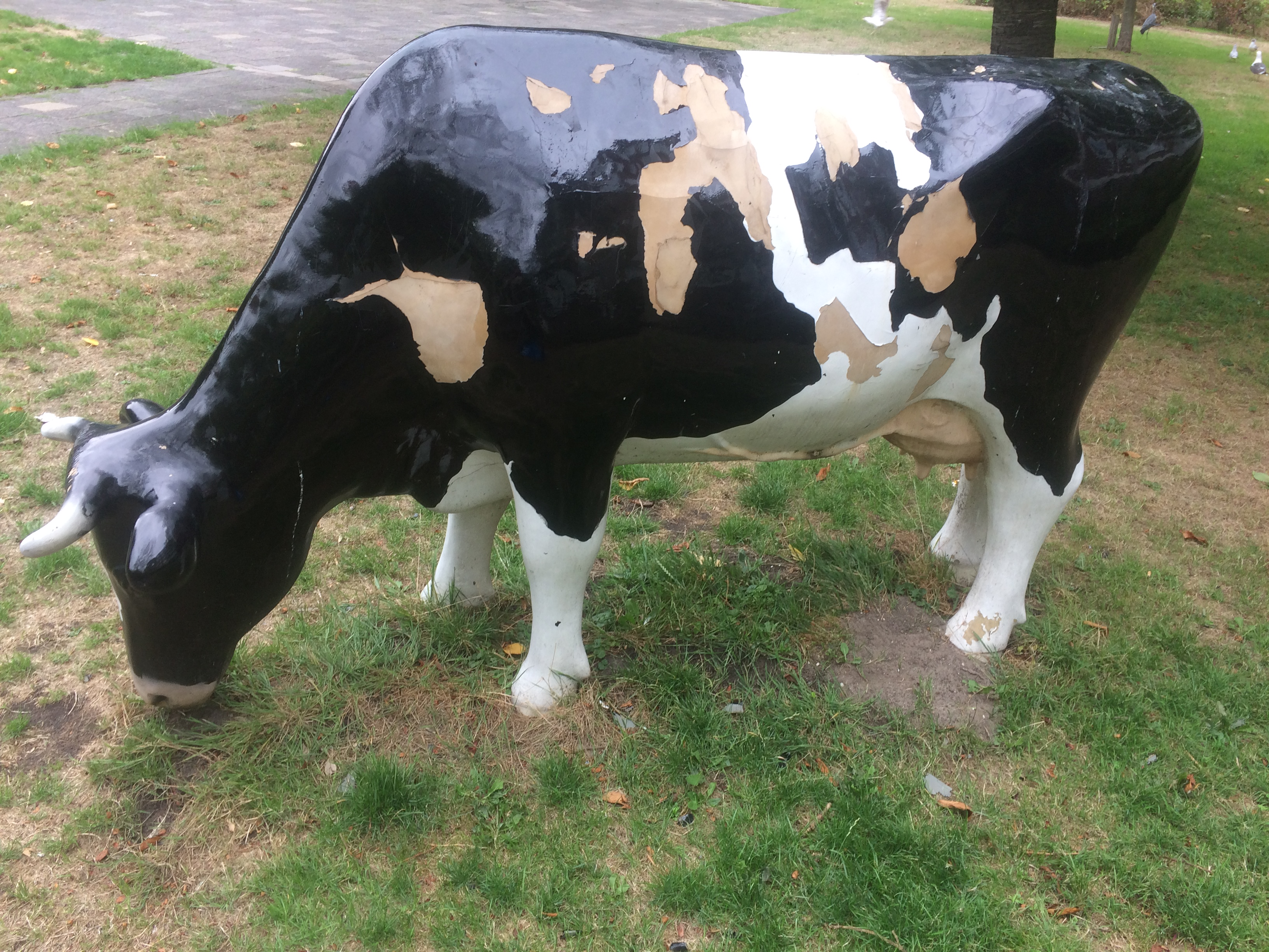 Beeld van een koe, aangeboden door Rochdale bij het 25-jarig bestaan van de bewonersvereniging Blomwijck in Osdorp.